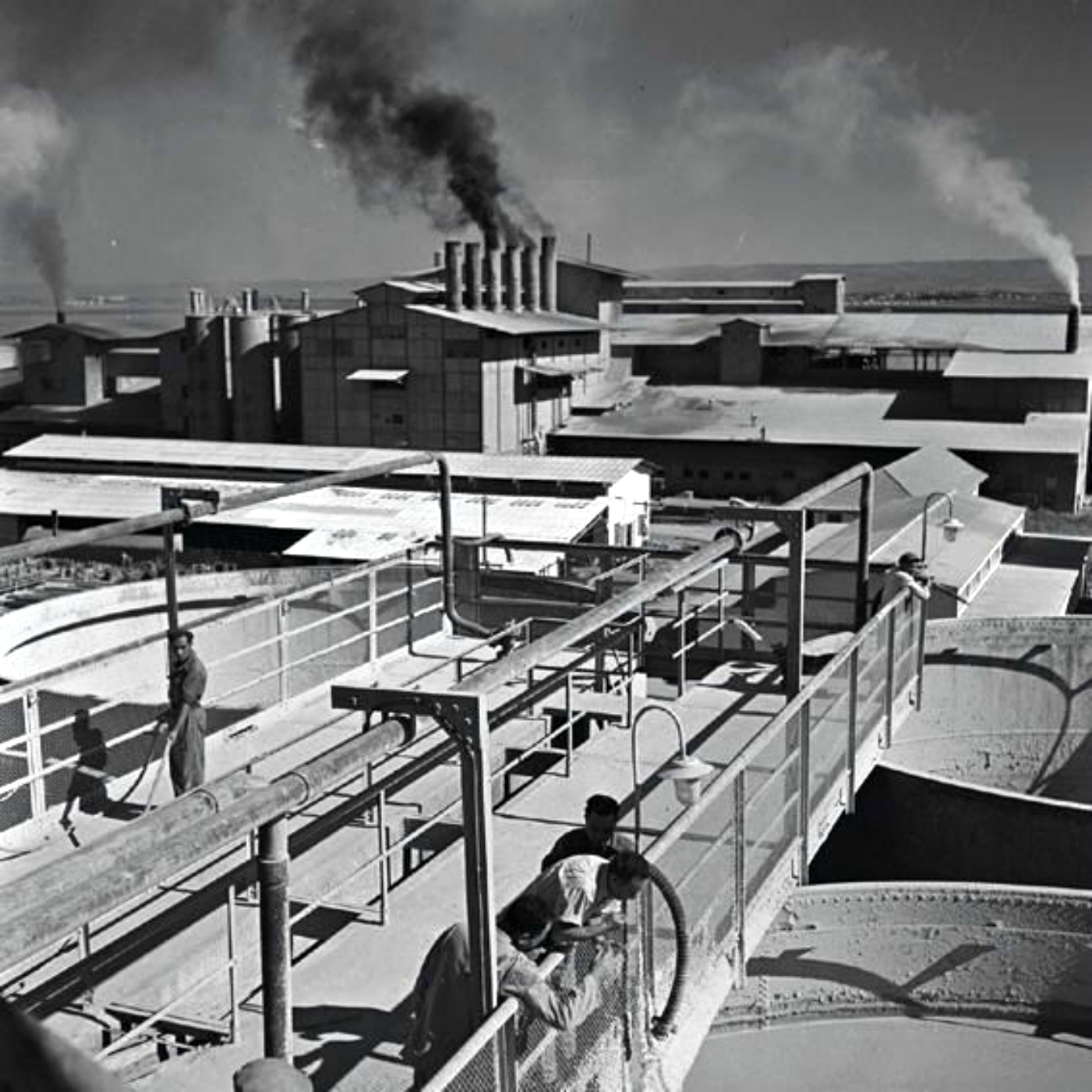 בית חרושת למלט "נשר" בחיפה.